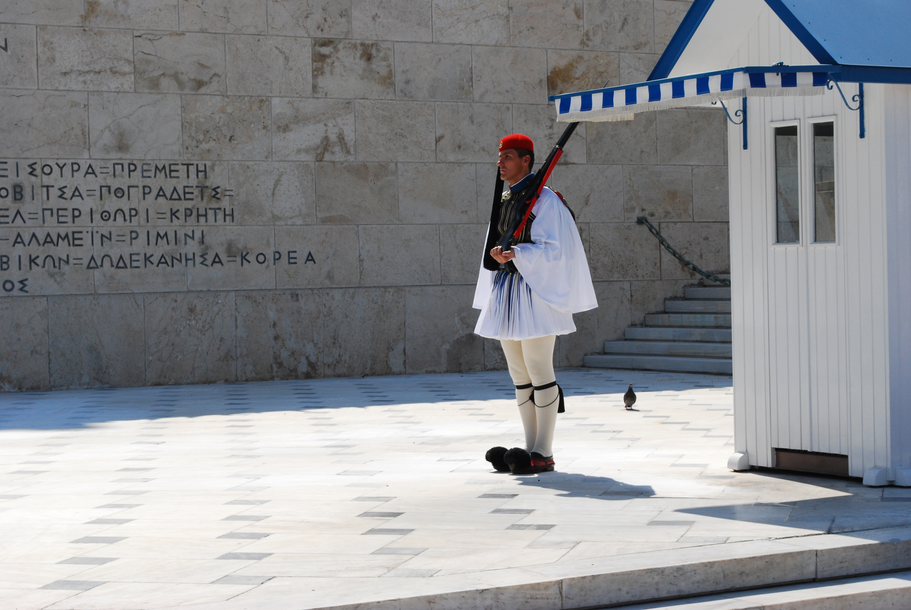 La relève de la garde au parlement grec, le dimanche 2 août 2009, à Athènes.